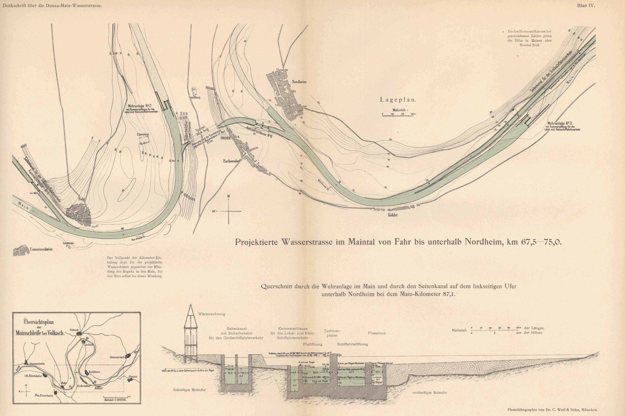 Projektierte Wasserstrasse im Maintal von Fahr bis unterhalb Nordheim, km 67,5—75,0. undQuerschnitt durch die Wehranlage im Main und durch den Seitenkanal auf dem linksseitigen Uferunterhalb Nordheim und dem Main-Kilometer 87,1.Karte (Blatt IV) ausDenkschrift zu dem technischen Entwurf einer neuen Donau-Main-Wasserstrasse von Kelheim nach Aschaffenburg,bearbeitet von Eduard Faber [(† 1930)],kgl. Bauamtmann und Vorstand des technischen Amtesdes Vereines für Hebung der Fluss- und Kanalschiffahrt in Bayern.Verlegtvon dem Vereine für Hebung der Fluss- und Kanalschiffahrt in Bayern.1903.